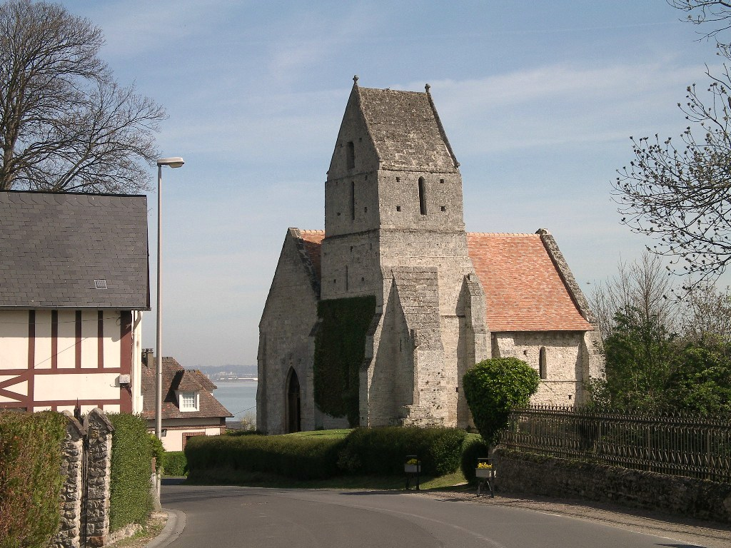 église St Martin de Cricqueboeuf, appelée Chapelle aux lierres XIIe (Calvados)